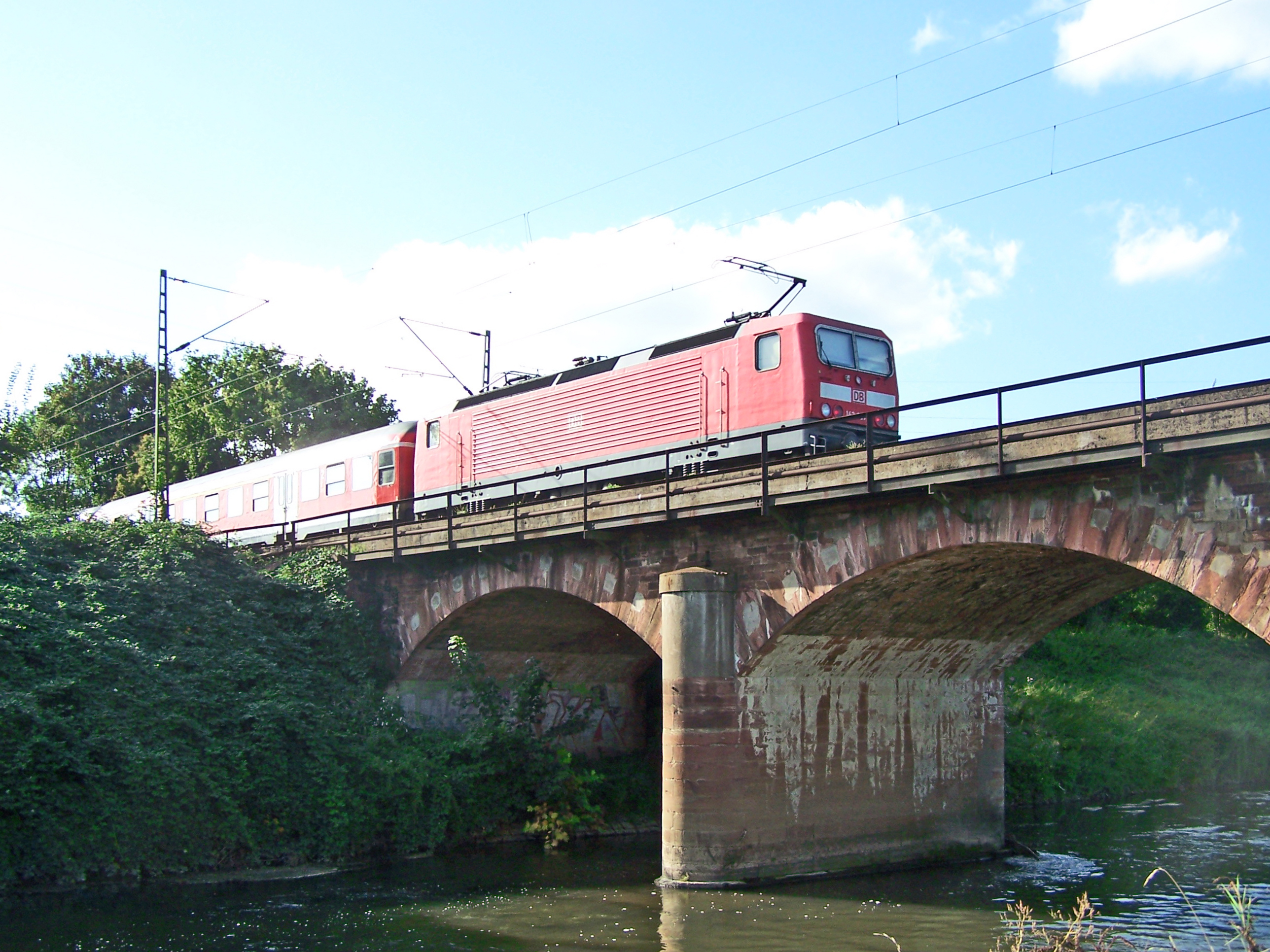 Zug von Wiesbaden überquert die Nidda nach Frankfurt